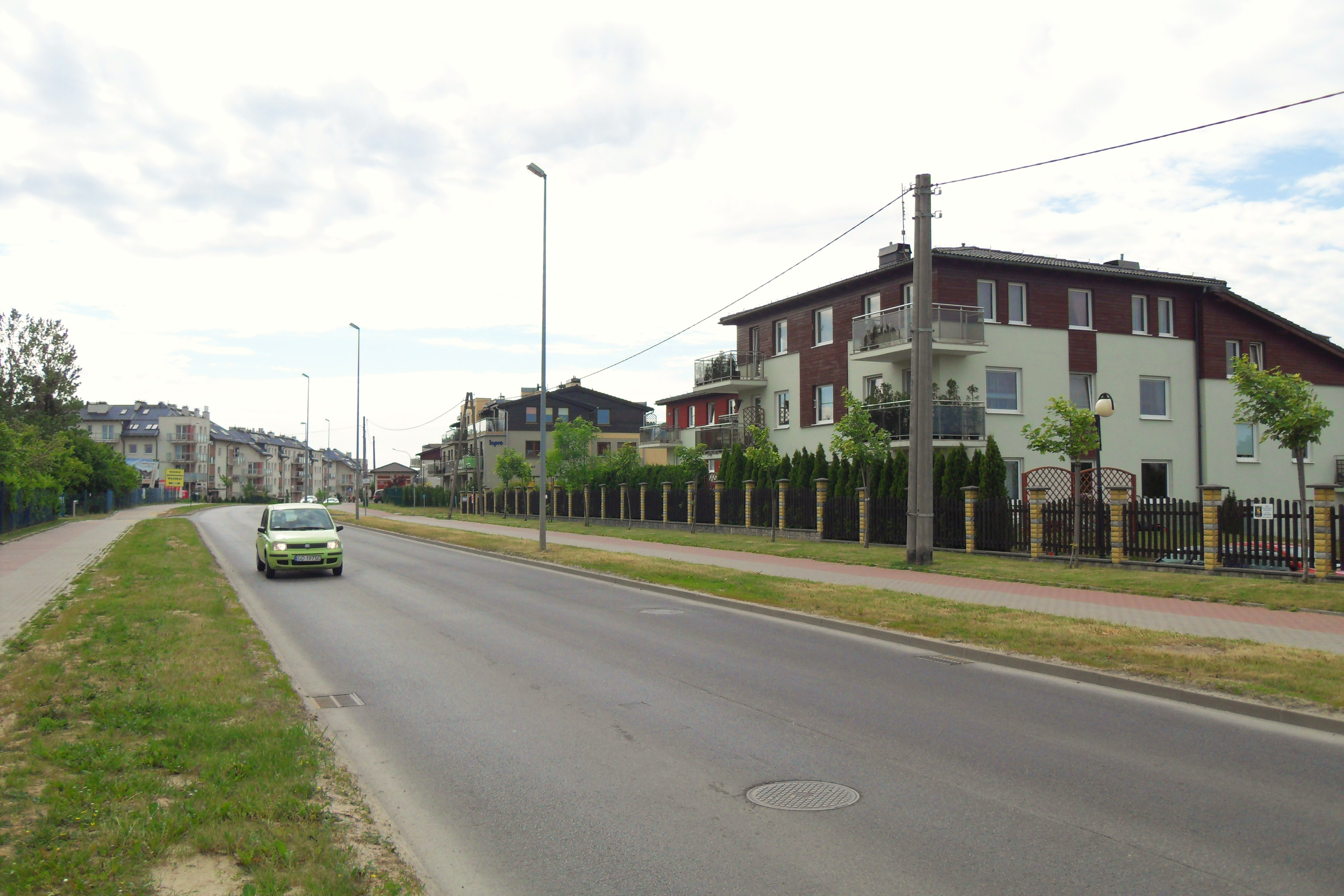 Gdańsk Migowo, ul. Myśliwska.